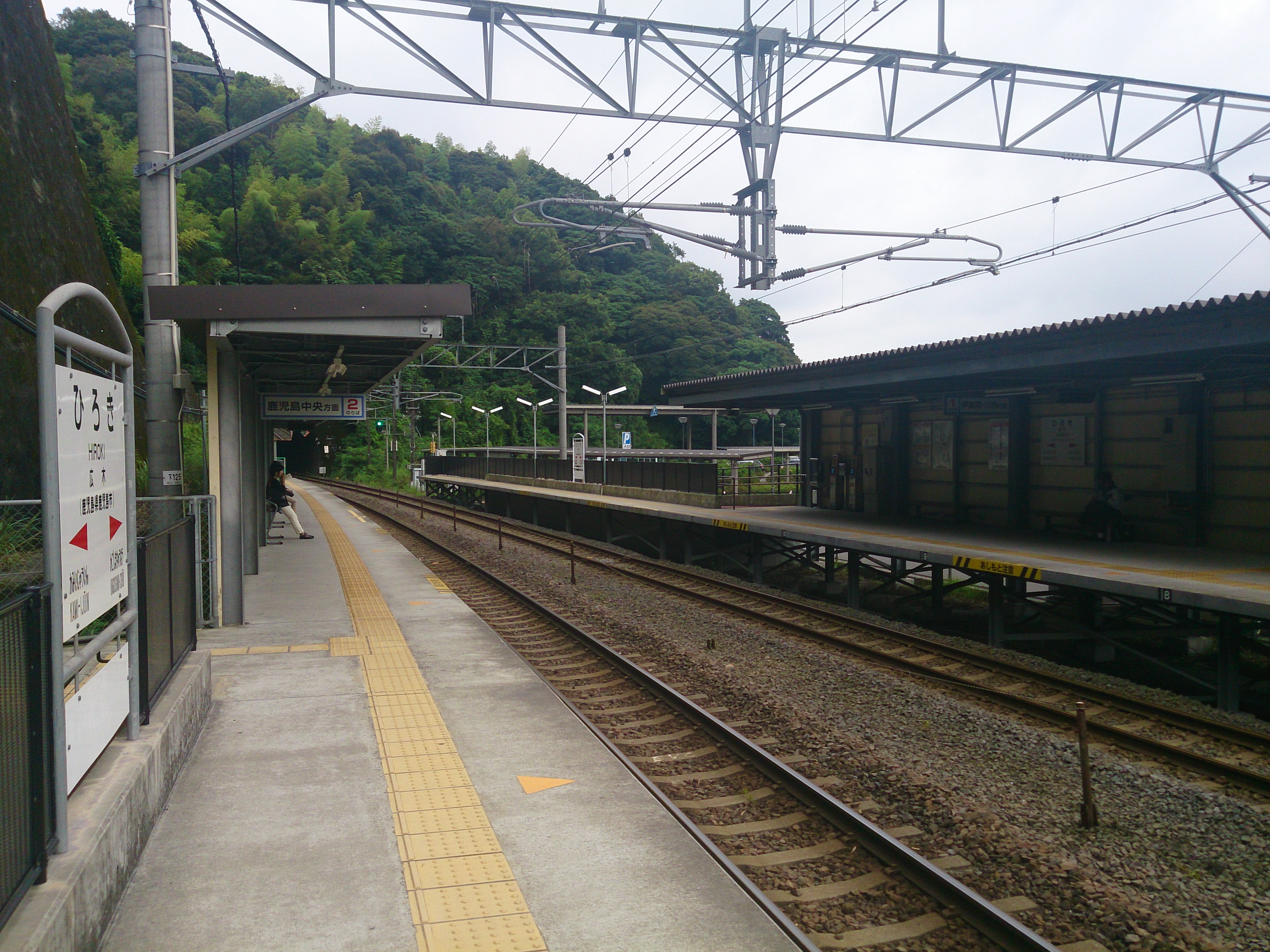 広木駅ホーム